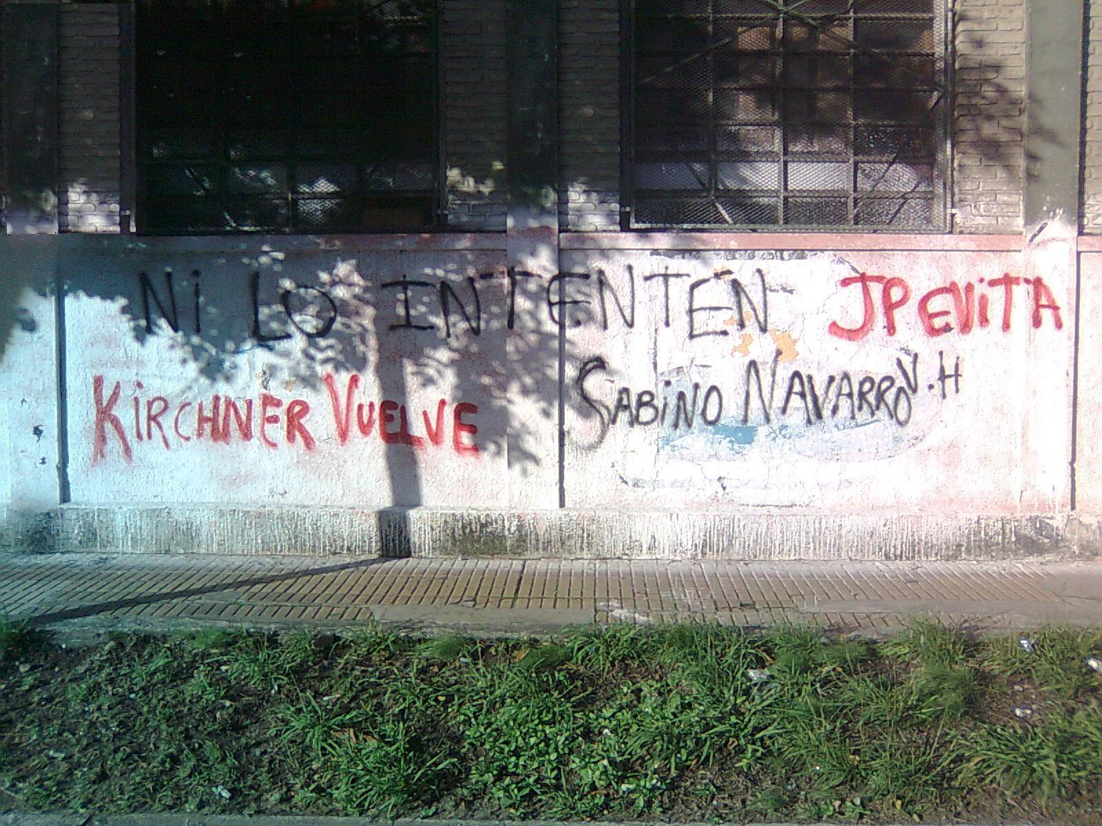 Graffiti de apoyo al ex presidente Néstor Kirchner, realizado por el grupo Sabino Navarro y la JP Evita.